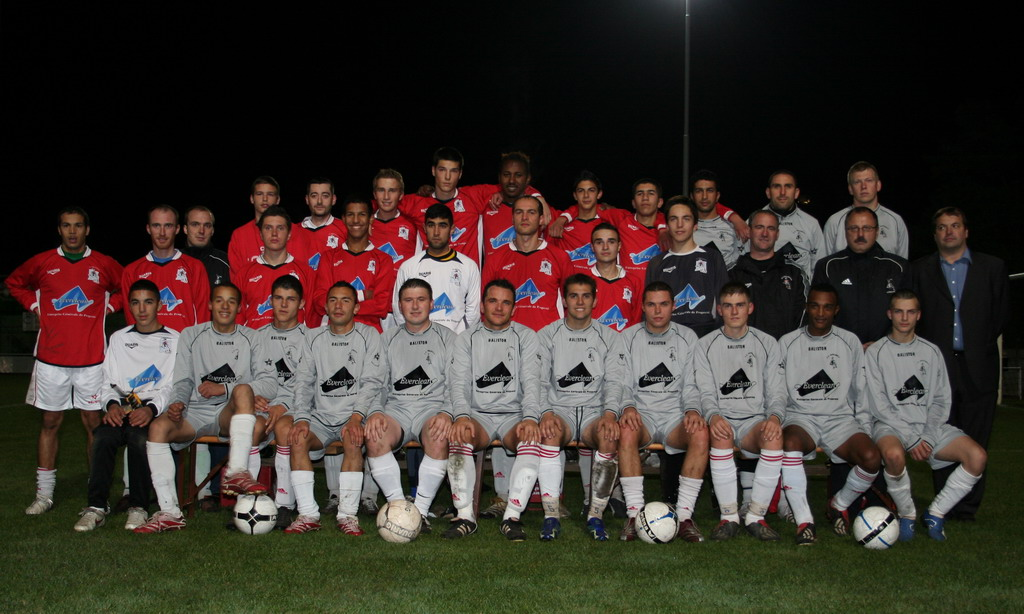 Equipe du SO-Merlebach Photo du 19 octobre 2007